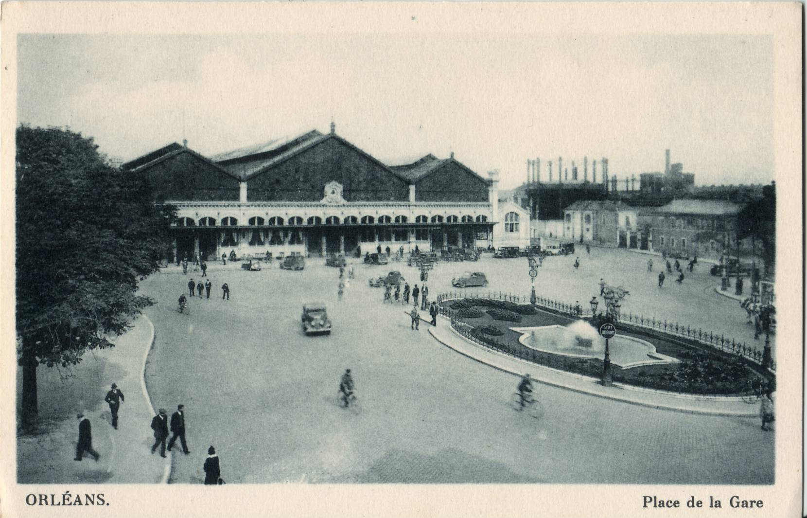 Carte postale ancienne, sans mention d'éditeur : ORLEANS - Place de la Gare